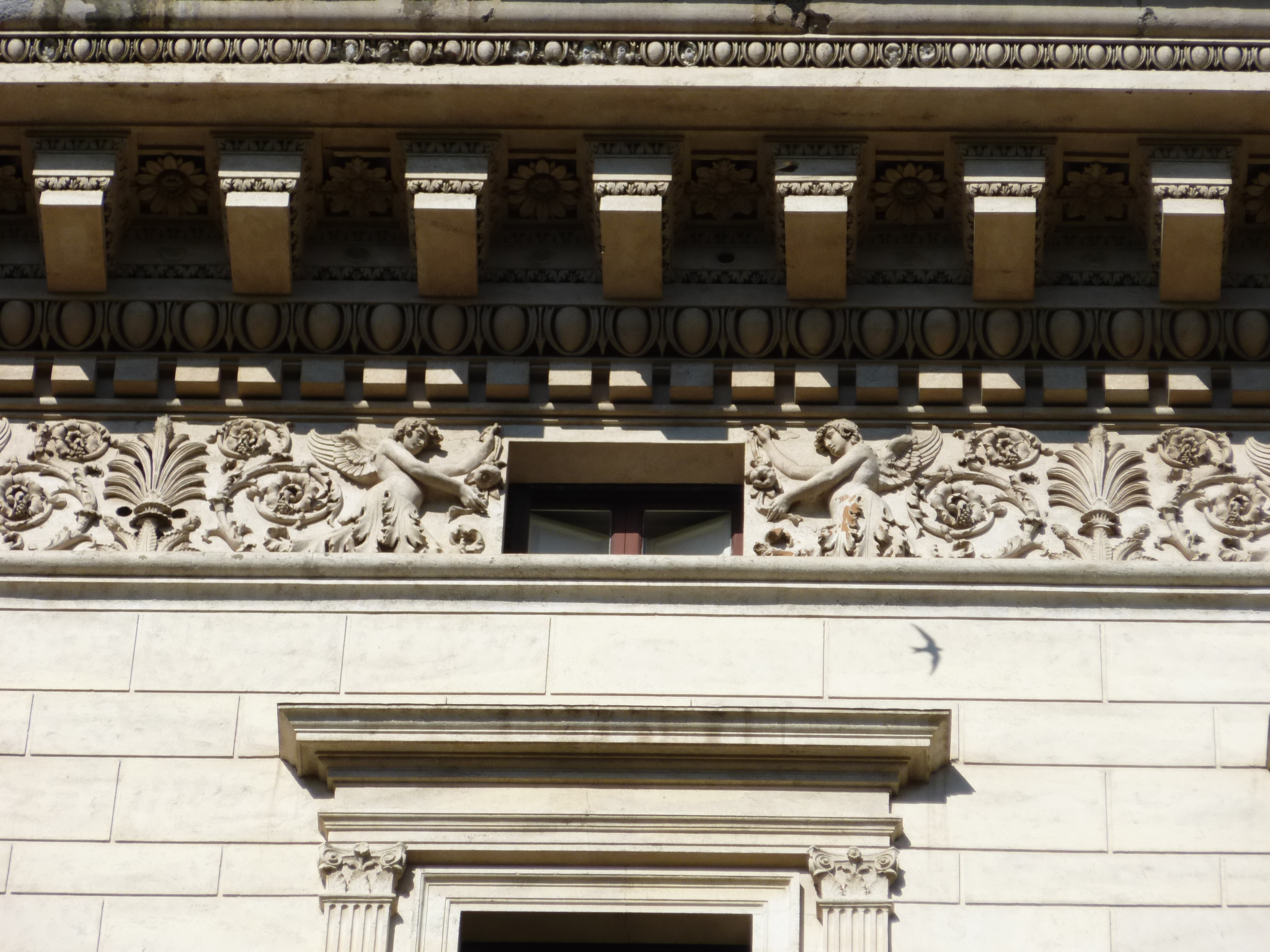 Roma, palazzo Brancaccio a via Merulana. Cornicione (particolare). Arch. Luca Carimini.